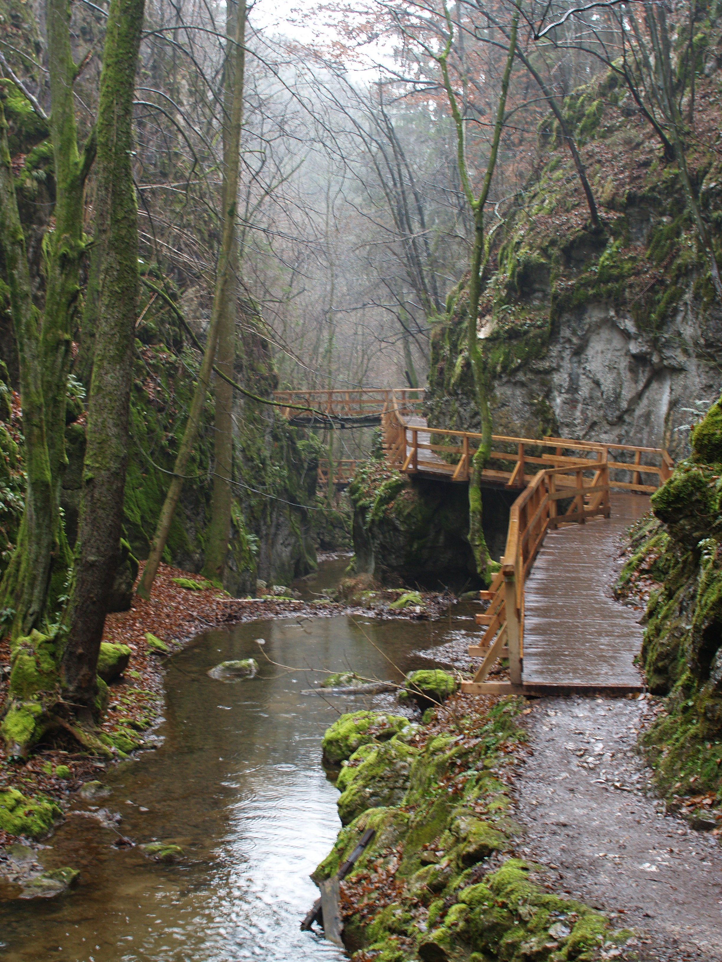 Johannesbachklamm im Dezember